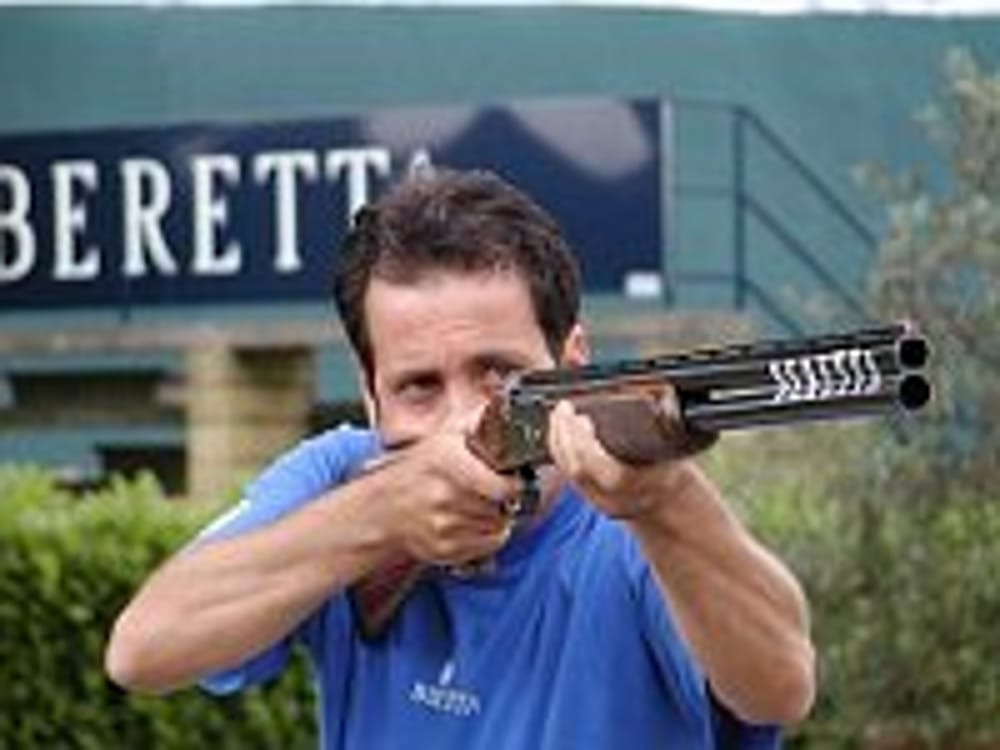 На Олимпиаде.jpg